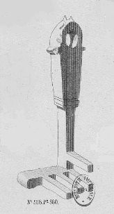 Site de l'atelier de poterie antique de la Manutention, quai Saint-Vincent, 1er arrondissement de Lyon, France. Clé antique inventoriée sous le n° 568, trouvée en 1843 lors du creusement des fondations de l'aile droite de la nouvelle Manutention des vivres. Dessin dans A. Comarmond, Description des antiquités et objets d'art contenus dans les salles du palais-des-arts de la ville de Lyon (monographie), Lyon, impr. F. Dumoulin, 1855-1857, 851 p., planche 15, n° d'inventaire 568. Texte commentant la clé : p. 360 (voir plus bas). La clé n° 568 fait partie des collections d'antiquités romaines du musée des Beaux-Arts de Lyon, ainsi qu'une autre clé antique trouvée dans les mêmes circonstances (n° d'inventaire 69).